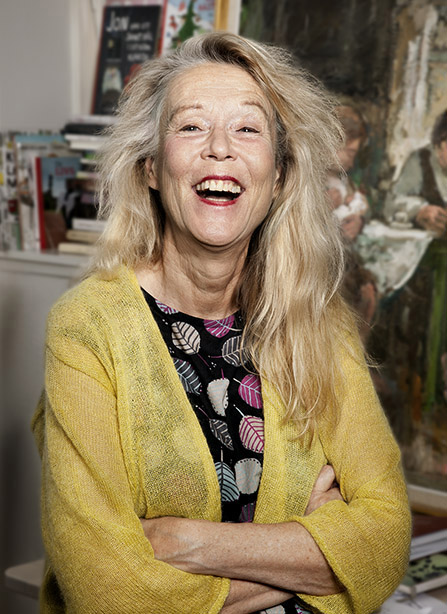 Foto på författaren Grethe Rottböll. Fotograf: Martin Nordström